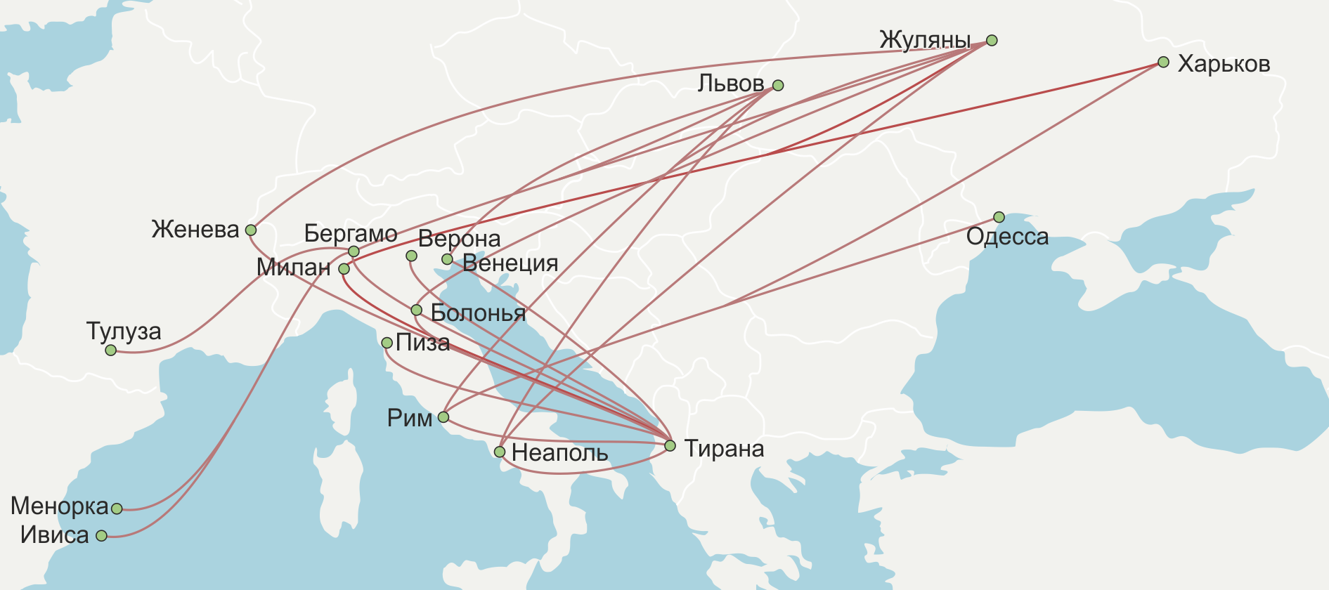 по расписанию зима 2019-2020